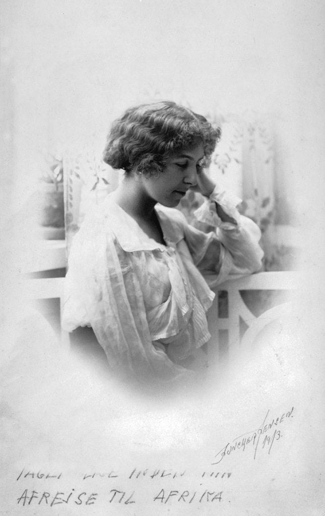 Ungdomsfotografi av Karen Dinesen (Karen Blixen). Fotograf Sophus Juncker-Jensen 1913. The text in danish, "Taget lige inden min afrejse til Afrika", means "Taken shortly before my departure for Africa".